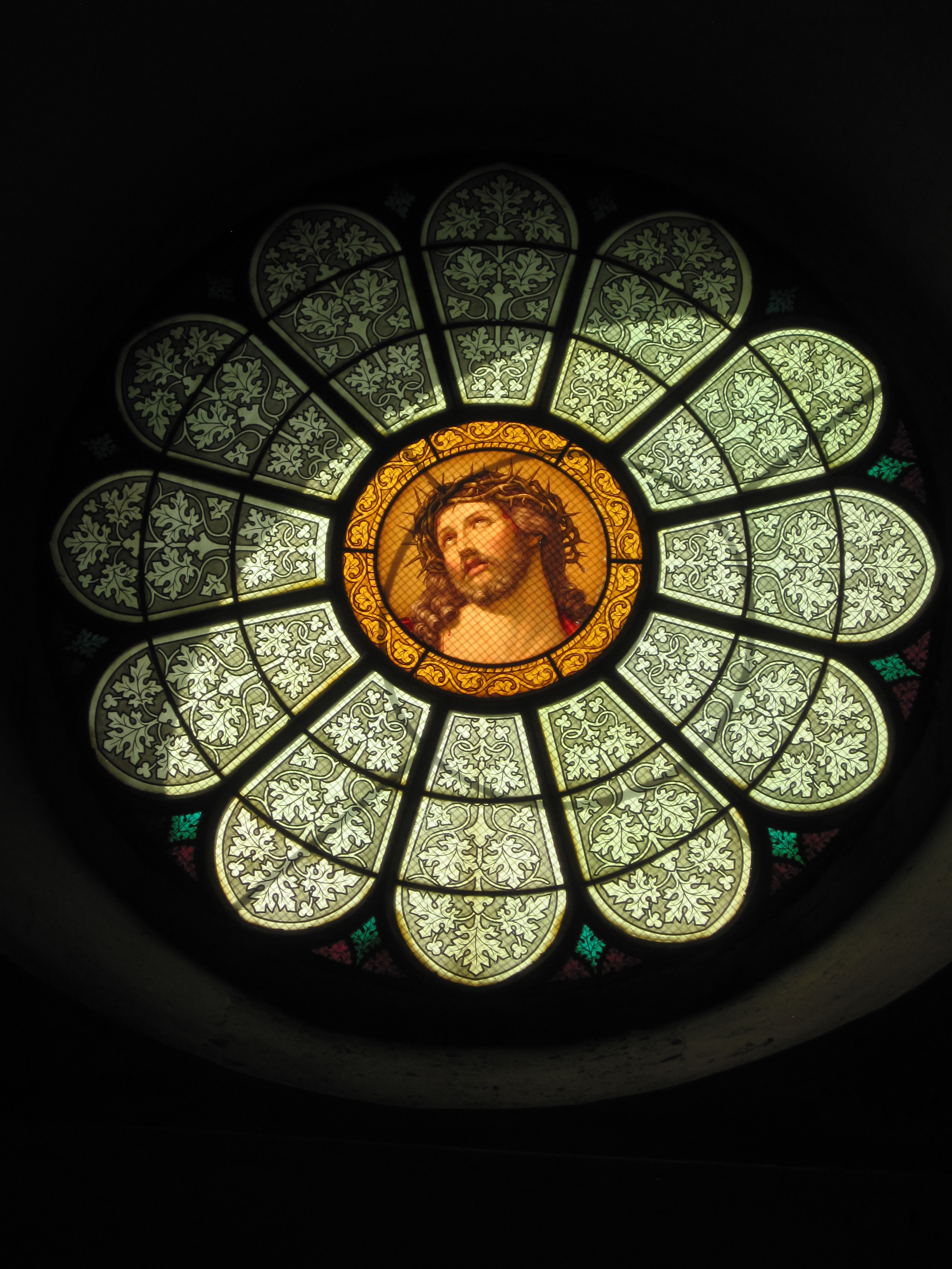 Rundfenster am westlichen Abschluss des Südschiffs von St. Marien (Groß Salitz)